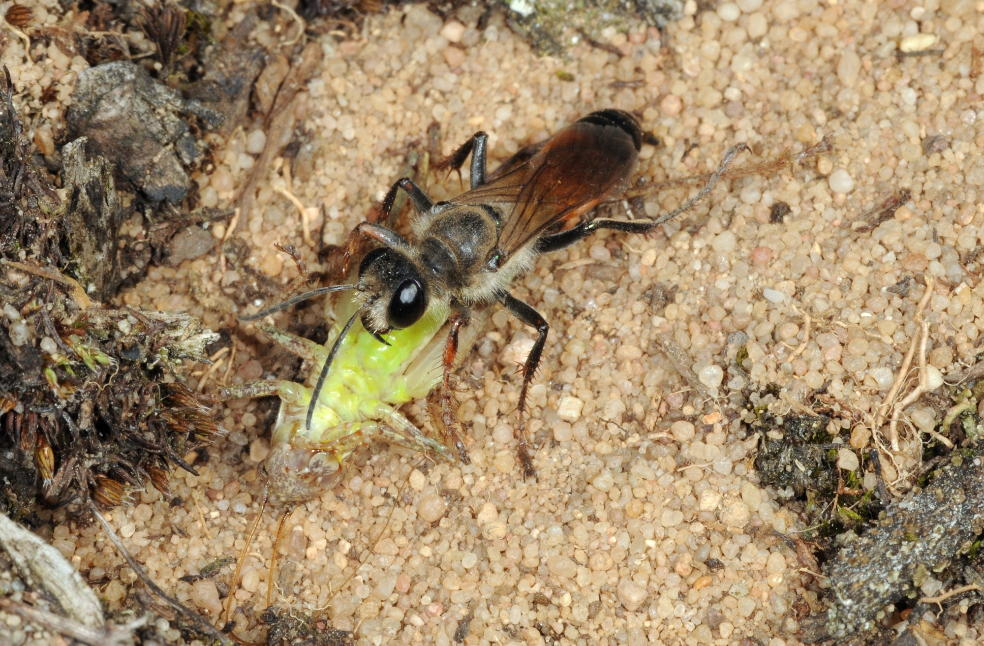 Sphex funerarius mit Pholidoptera griseoaptera als Beute, Stromtrasse bei Kelsterbach - neben Startbahn West, Hessen, Deutschland